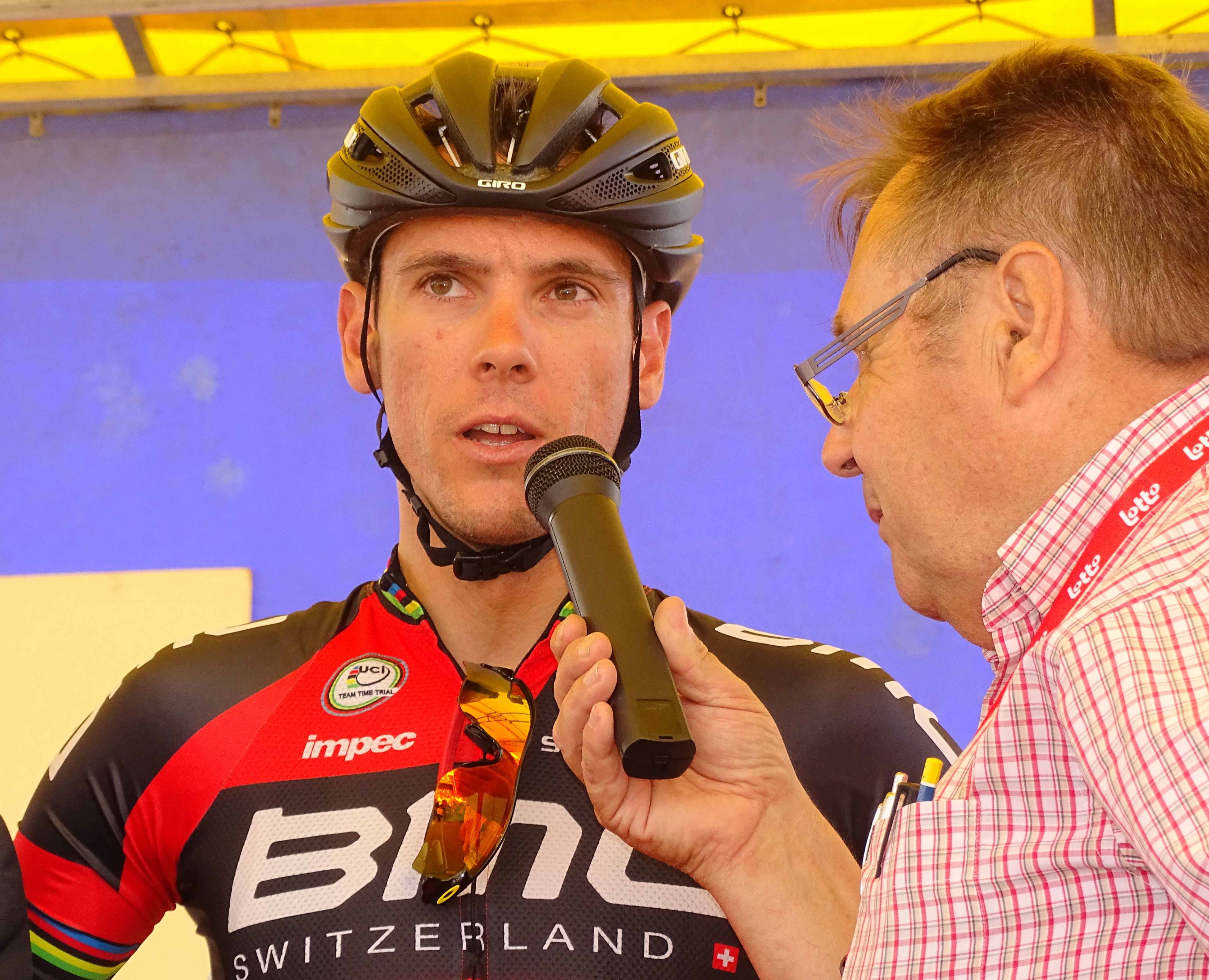 Reportage réalisé le mercredi 22 juillet à l'occasion du départ du Grand Prix Pino Cerami 2015 à Saint-Ghislain, Belgique.